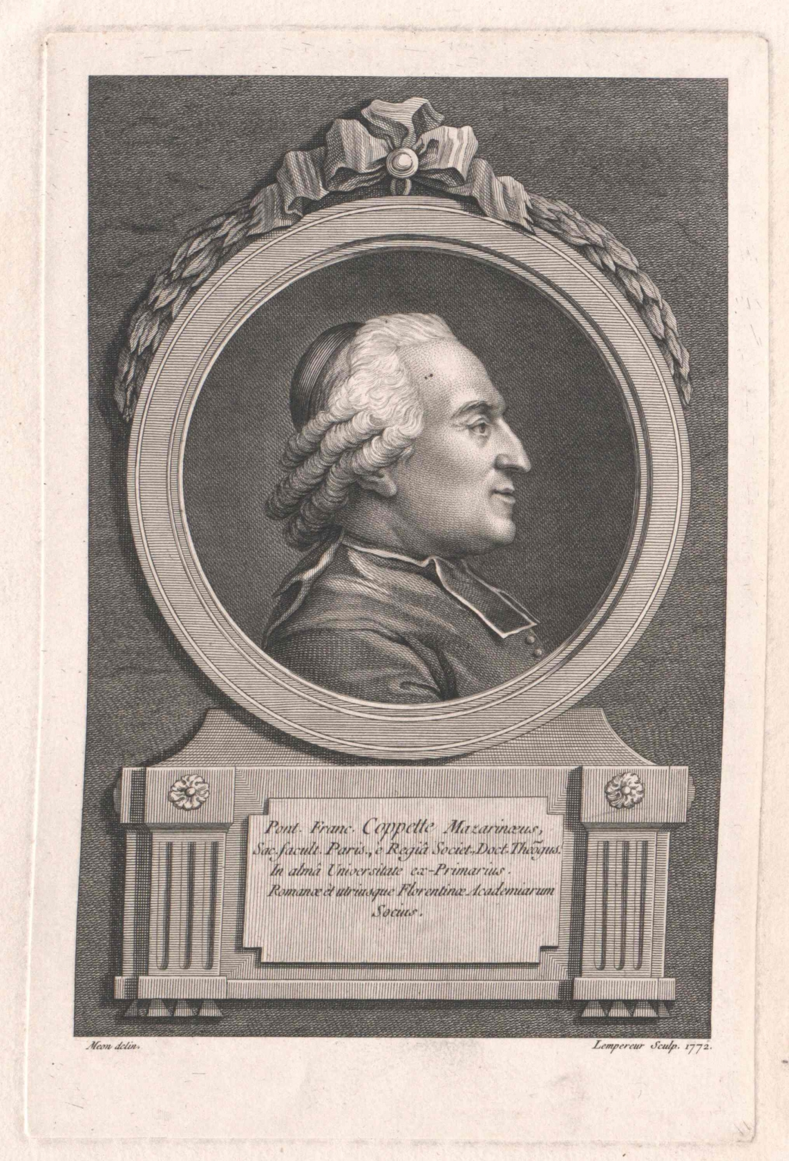 portrait gravé de Ponce-François Copette, dessiné par Jean-Baptiste Méon & gravé par Louis-Simon Lempereur. Ce portrait fut gravé et colorié, à la demande de P.-F. Copette, pour offrir à Charlotte-Catherine Cosson.